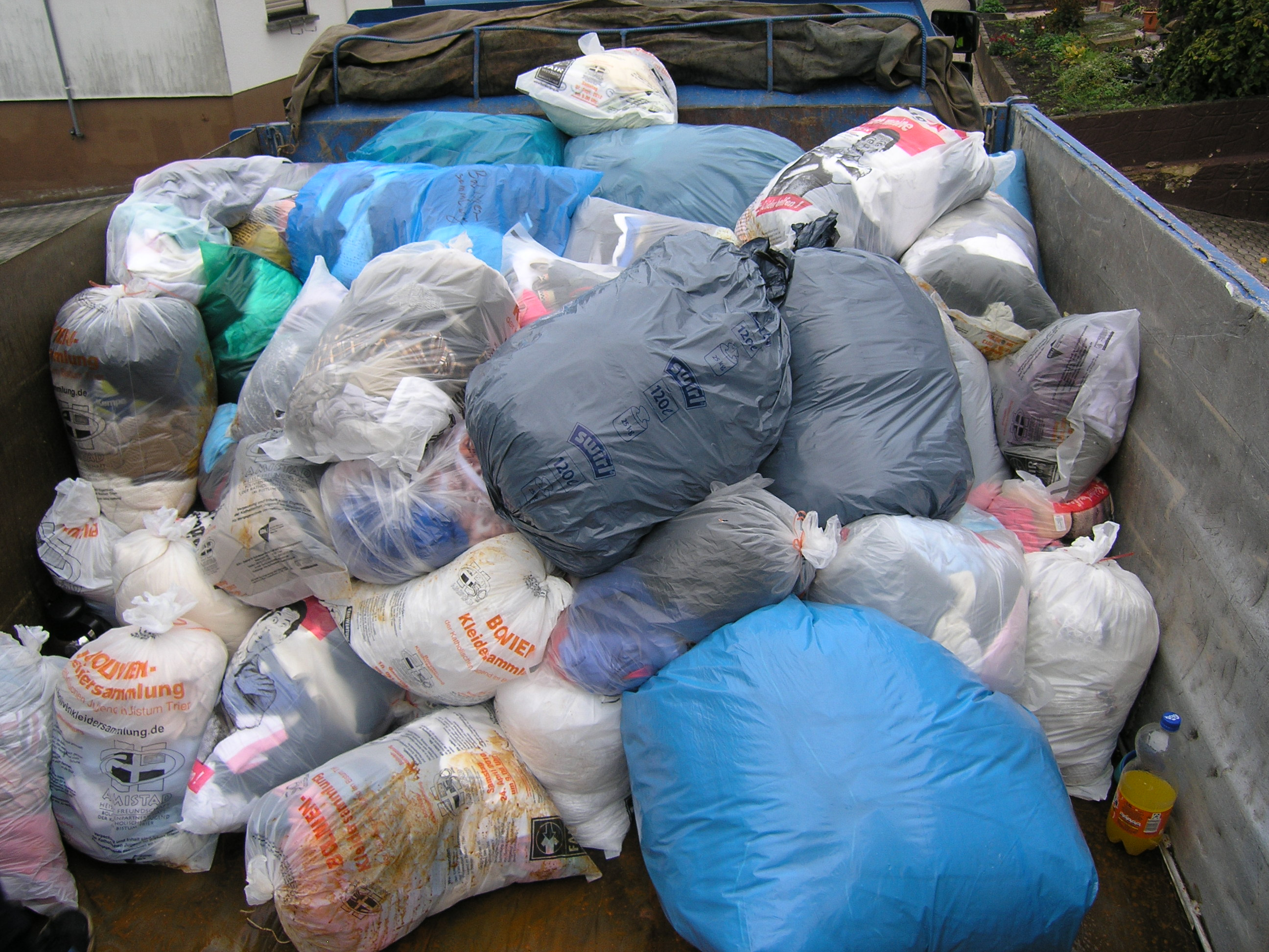 "Bolivien-Kleidersammlung" des Bistums Trier, Einsammelvorgang der Kleidersäcke auf einem LKW.